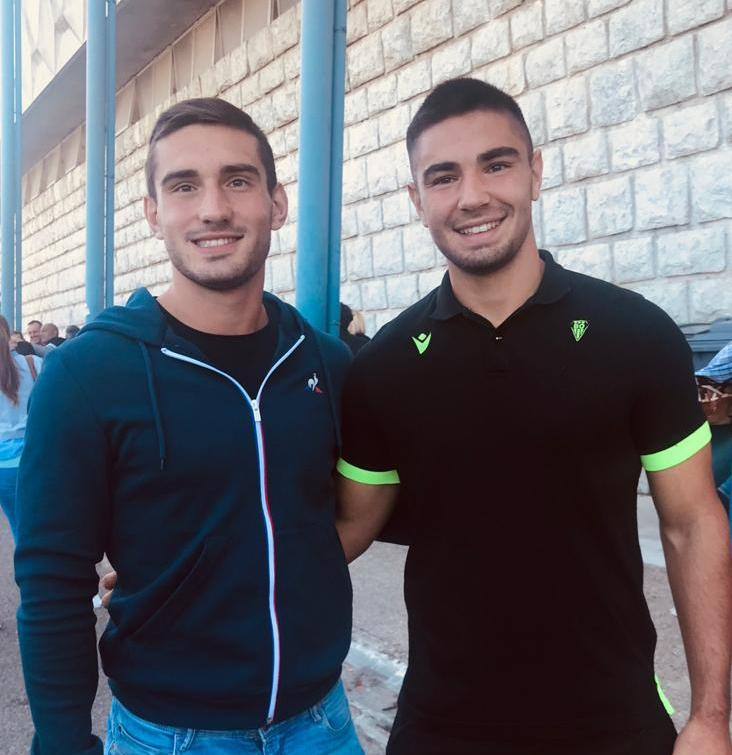 Les deux frères COUILLOUD